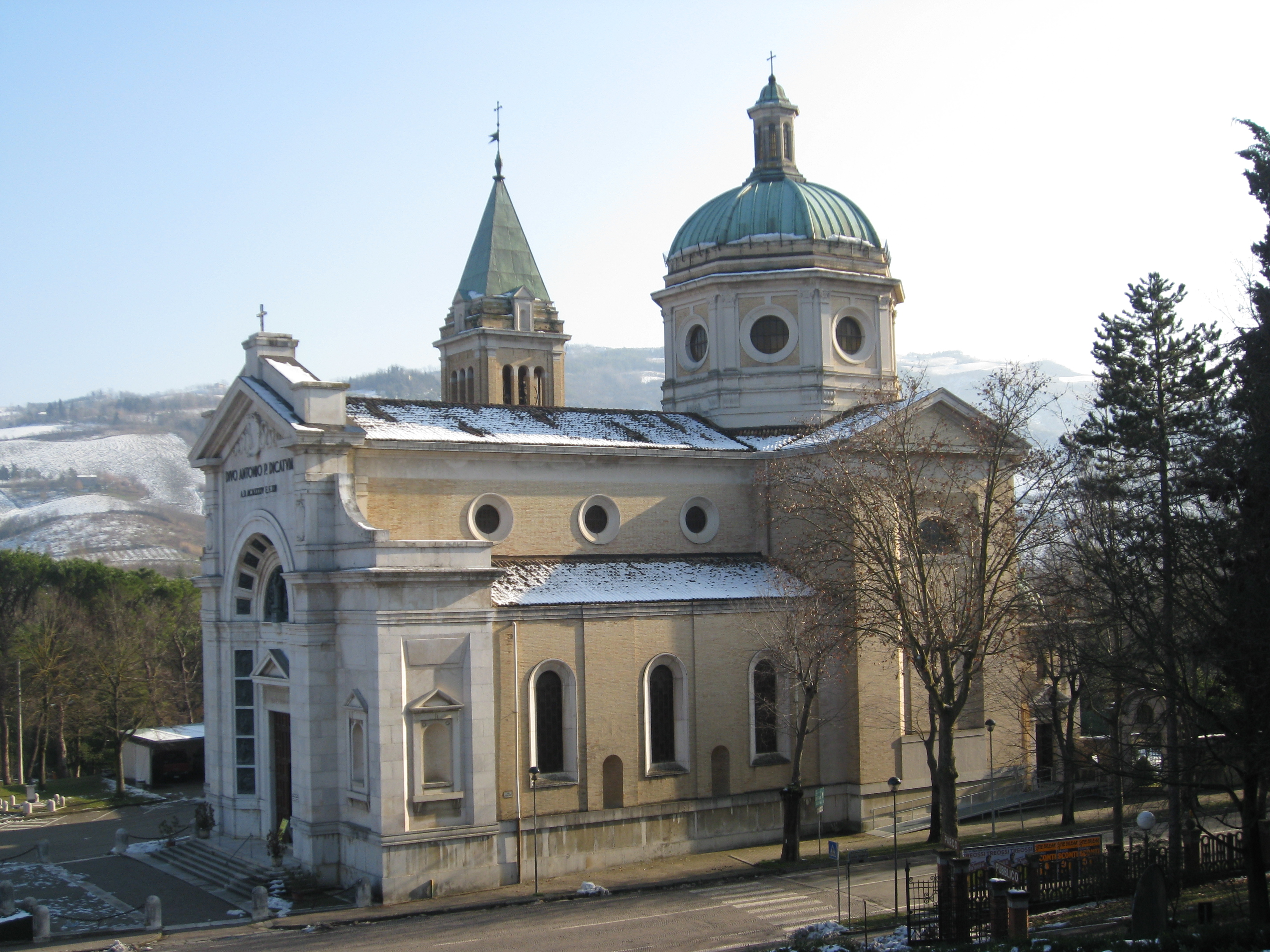 Chiesa di Sant'Antonio a Predappio.